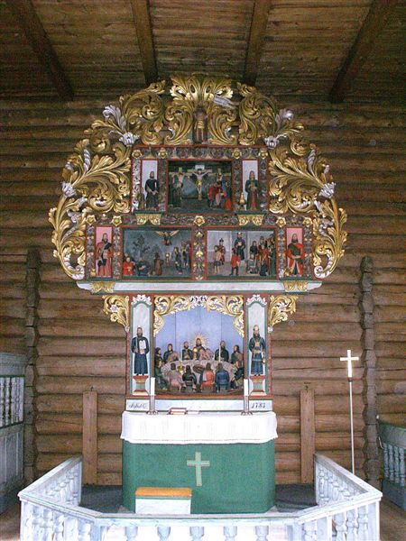 Altertavle skåret av Estil Guttormsen Kjørrn (1723-1805) ca. 1783. Sel kirke i Oppland.